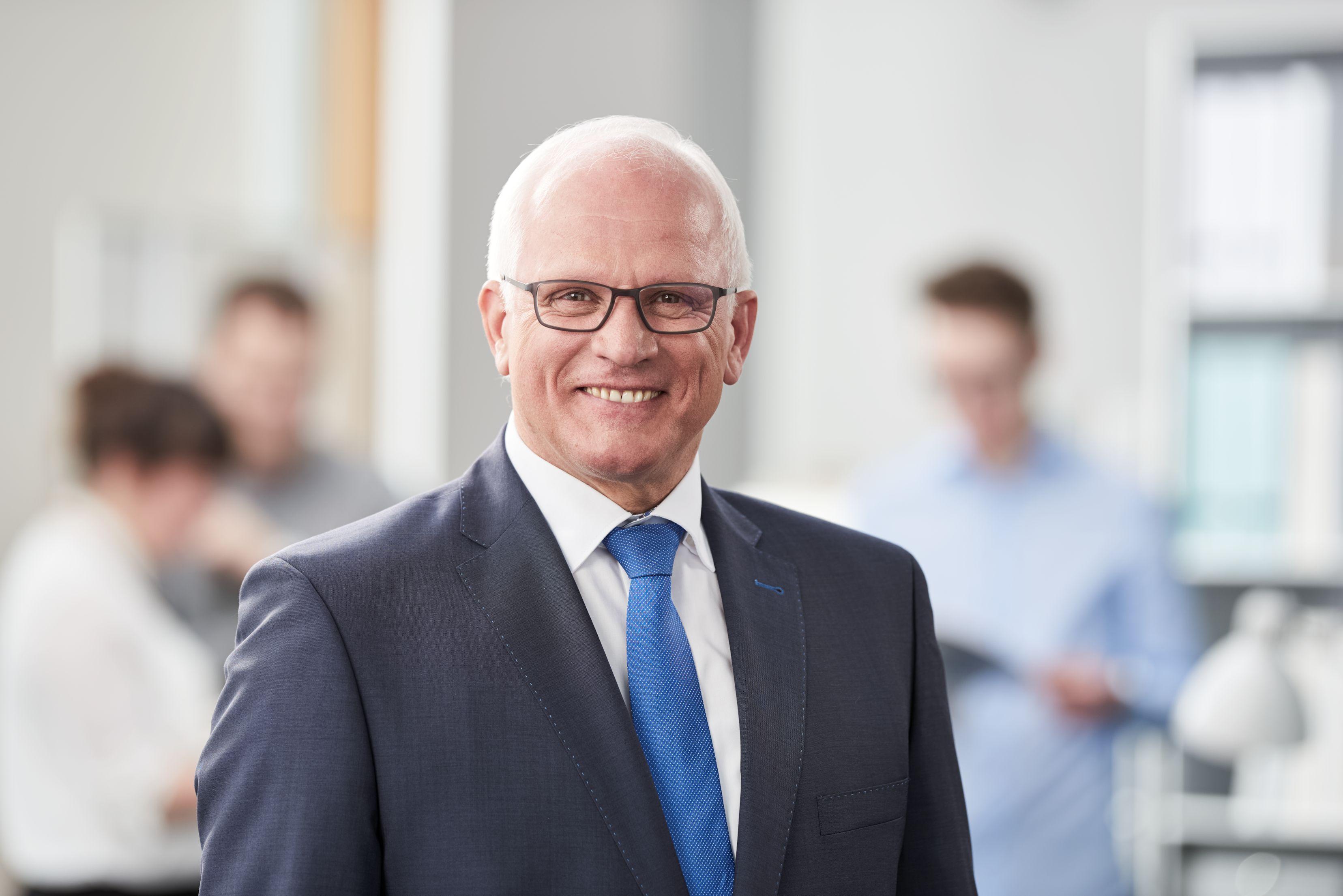 Peter Bleser (2017)